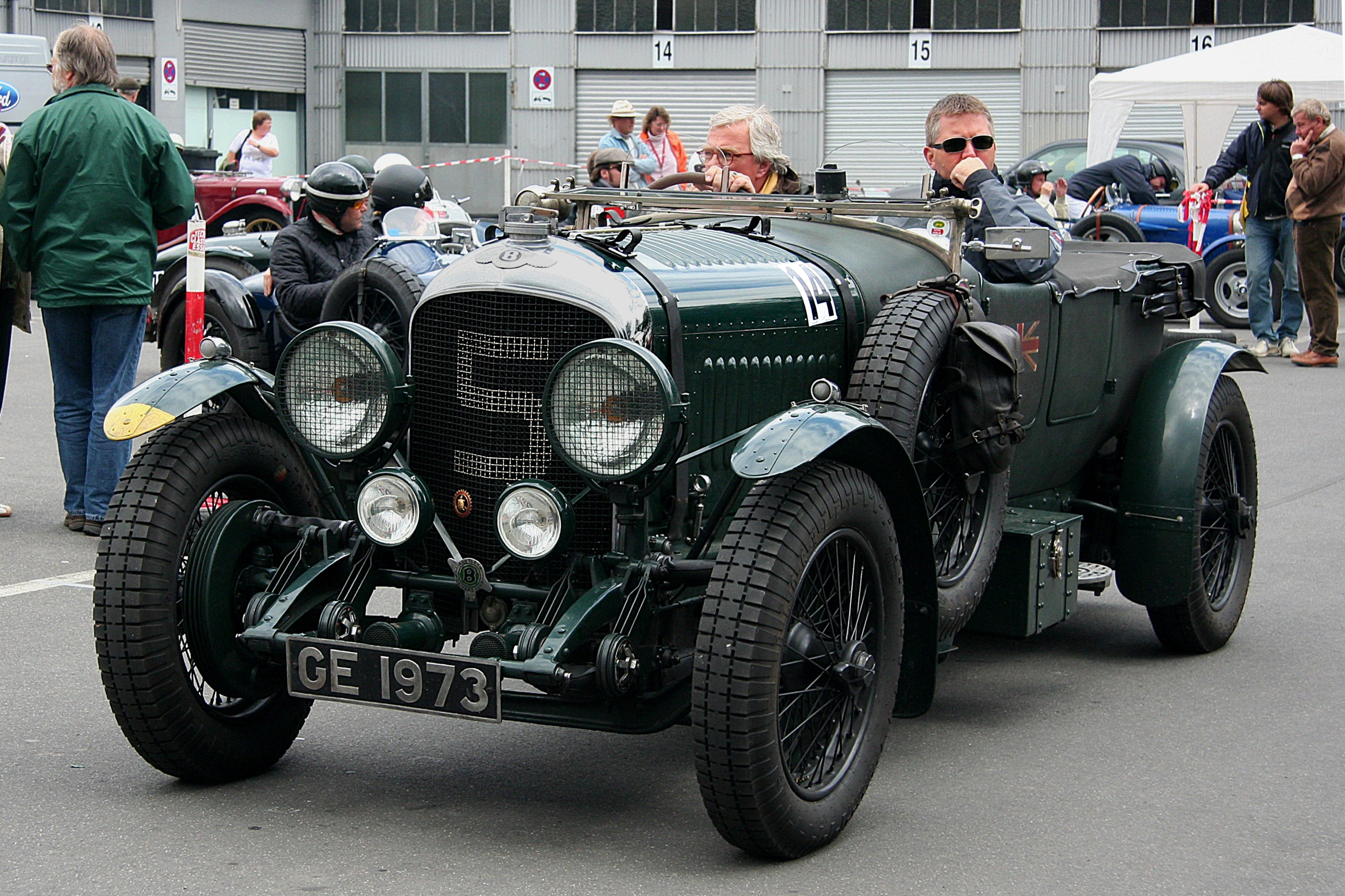 Bentley 4½-litre, Baujahr 1928, beim Oldtimer Festival des DAMC im historischen Fahrerlager des Nürburgrings delivered July 1928 (Original body was a Weymann saloon by H J Mulliner) Chassis PM3264 Engine PM3263 Reg GE 1973